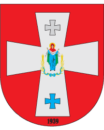 Герб Рожищенського району